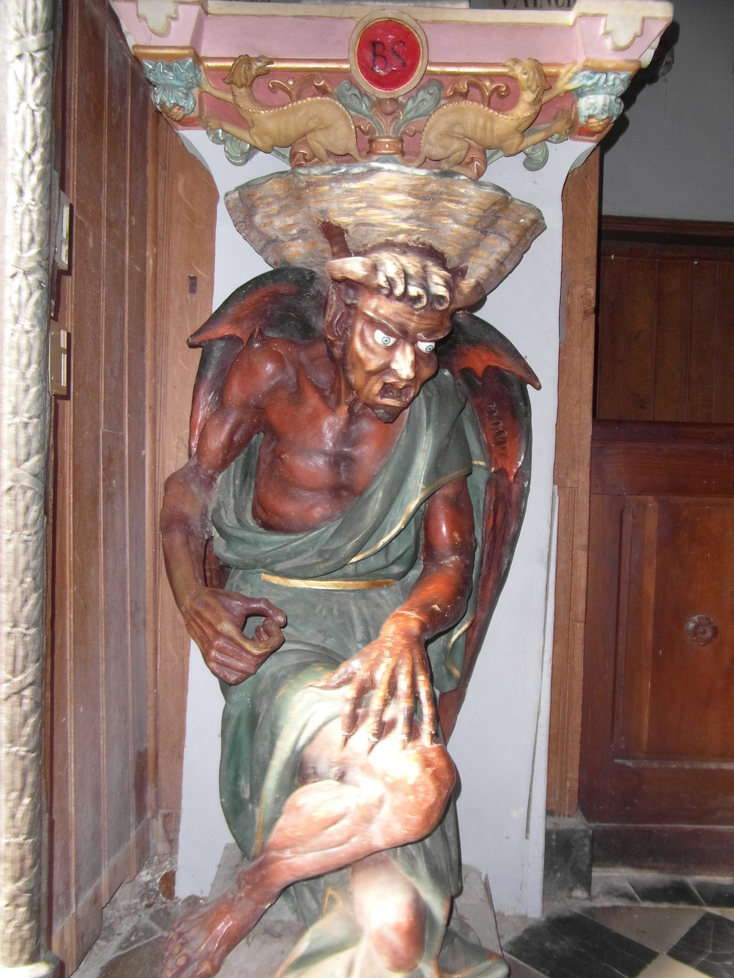 Le diable de Rennes le Chateau